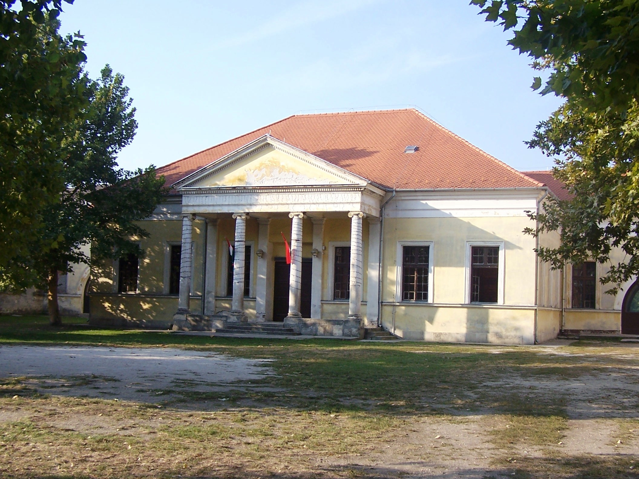 Sándor-Metternich kastély, általános iskola (Biatorbágy, (Bia) Szentháromság tér 4 .) This is a photo of a monument in Hungary, Identifier: 6908